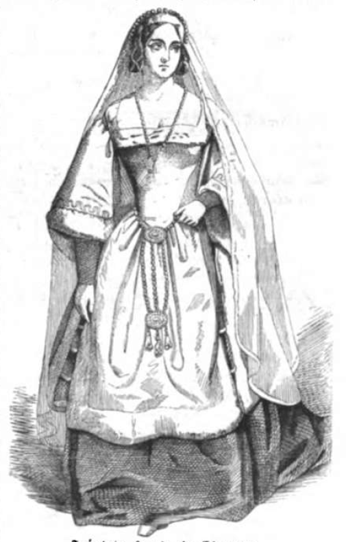 Fräulein Haus als Eleonore